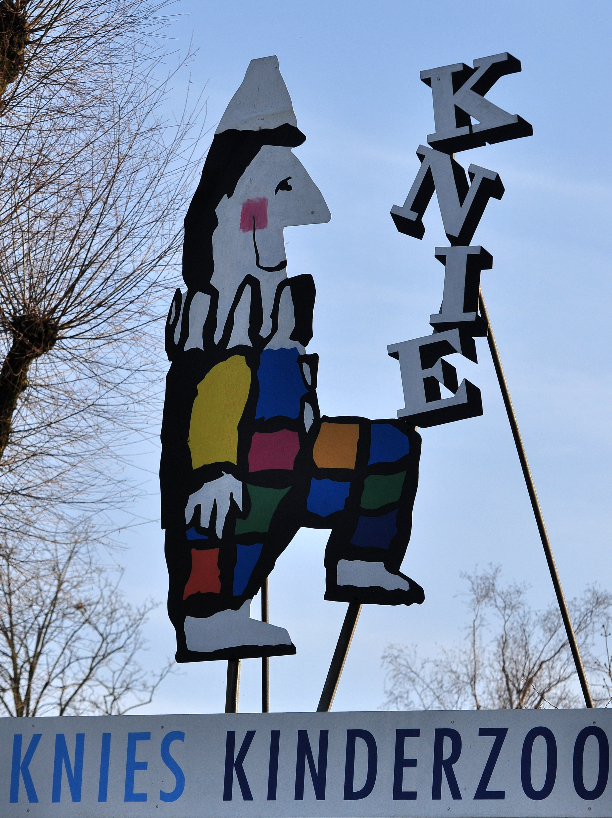 Circus Knie in Rapperswil (Switzerland)